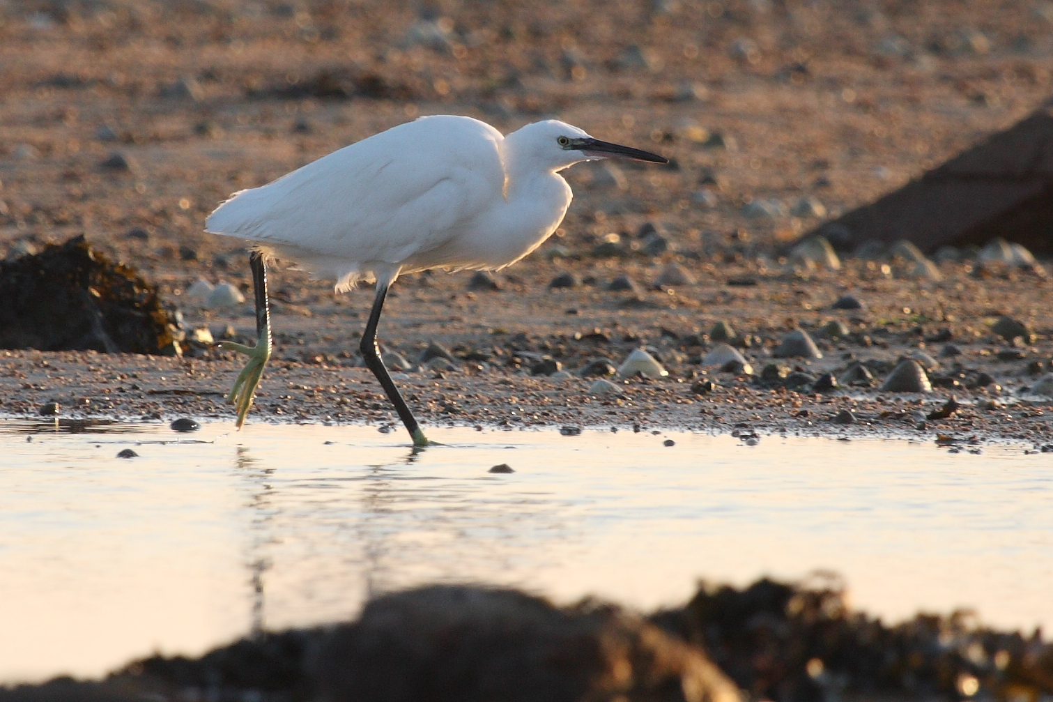 Little Egret. Location: La Rocque, Jersey, Channel Islands.